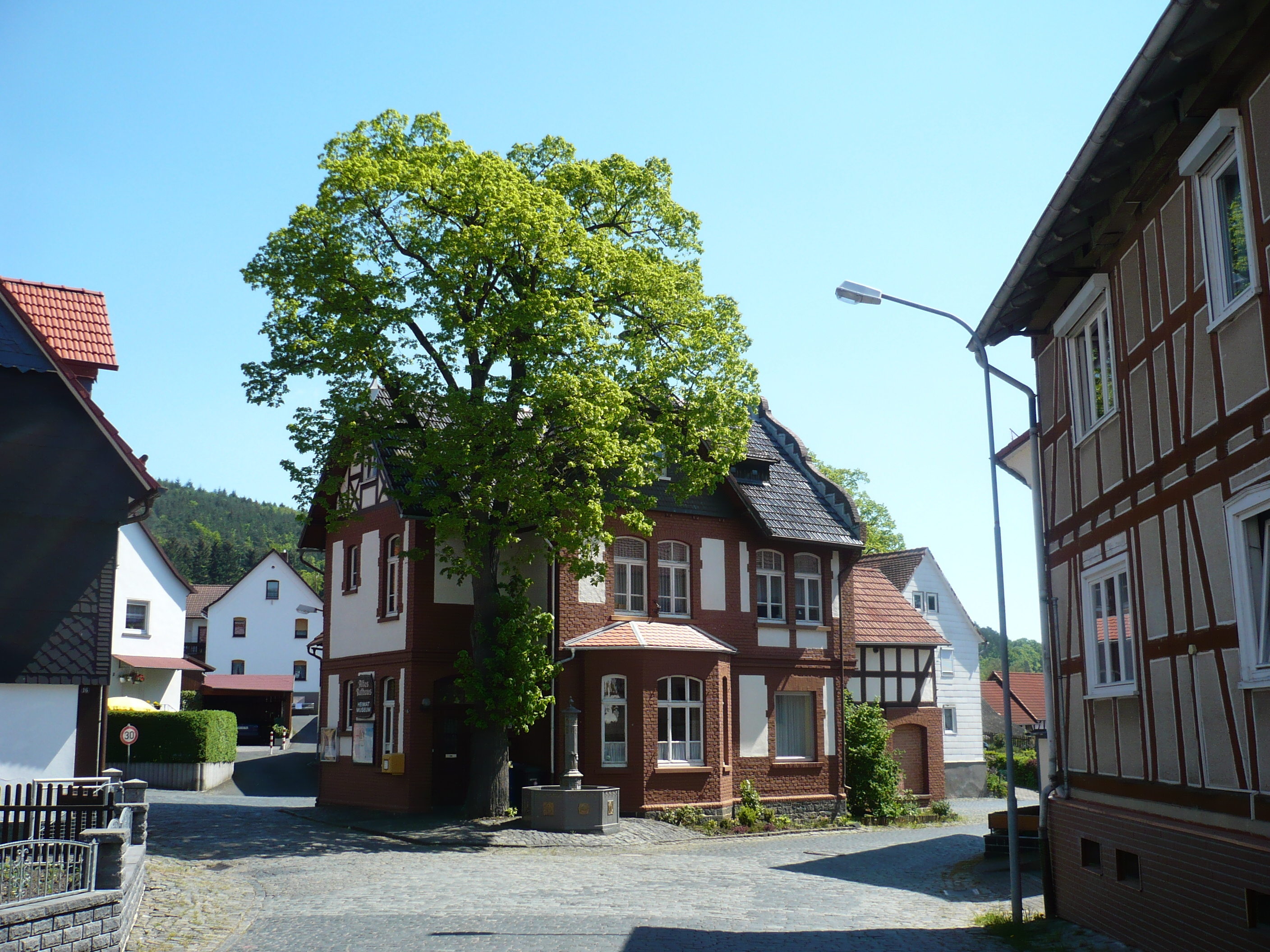 1905 erbautes Rathaus von Buchenau